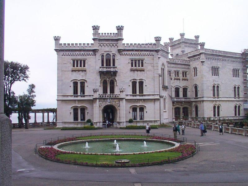 Castello di Miramare (Trieste)